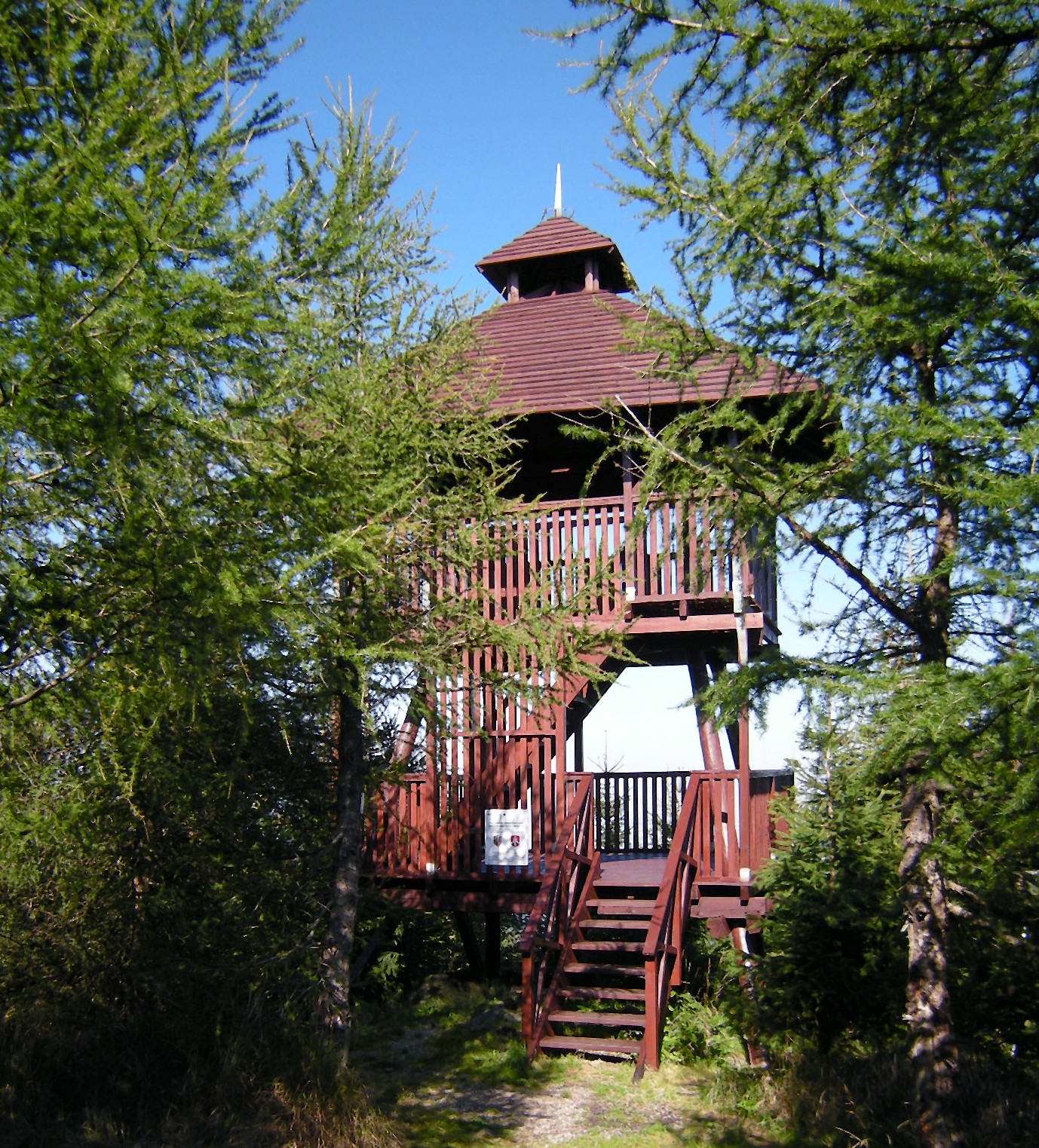 Platforma widokowa na Jaworniku Wielkim